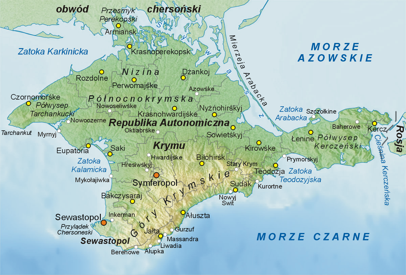 Mapa Półwyspu Krymskiego. Na pomarańczowo zaznaczono stolicę Republiki Autonomicznej Krymu oraz miasta wydzielonego Sewastopola, na żółto miasta rejonowe i miasta wydzielone, na biało pozostałe miejscowości Parametry do szablonu (współrzędne krawędzi): top = 46.3 bottom = 44.2 left = 32.4 right = 36.8